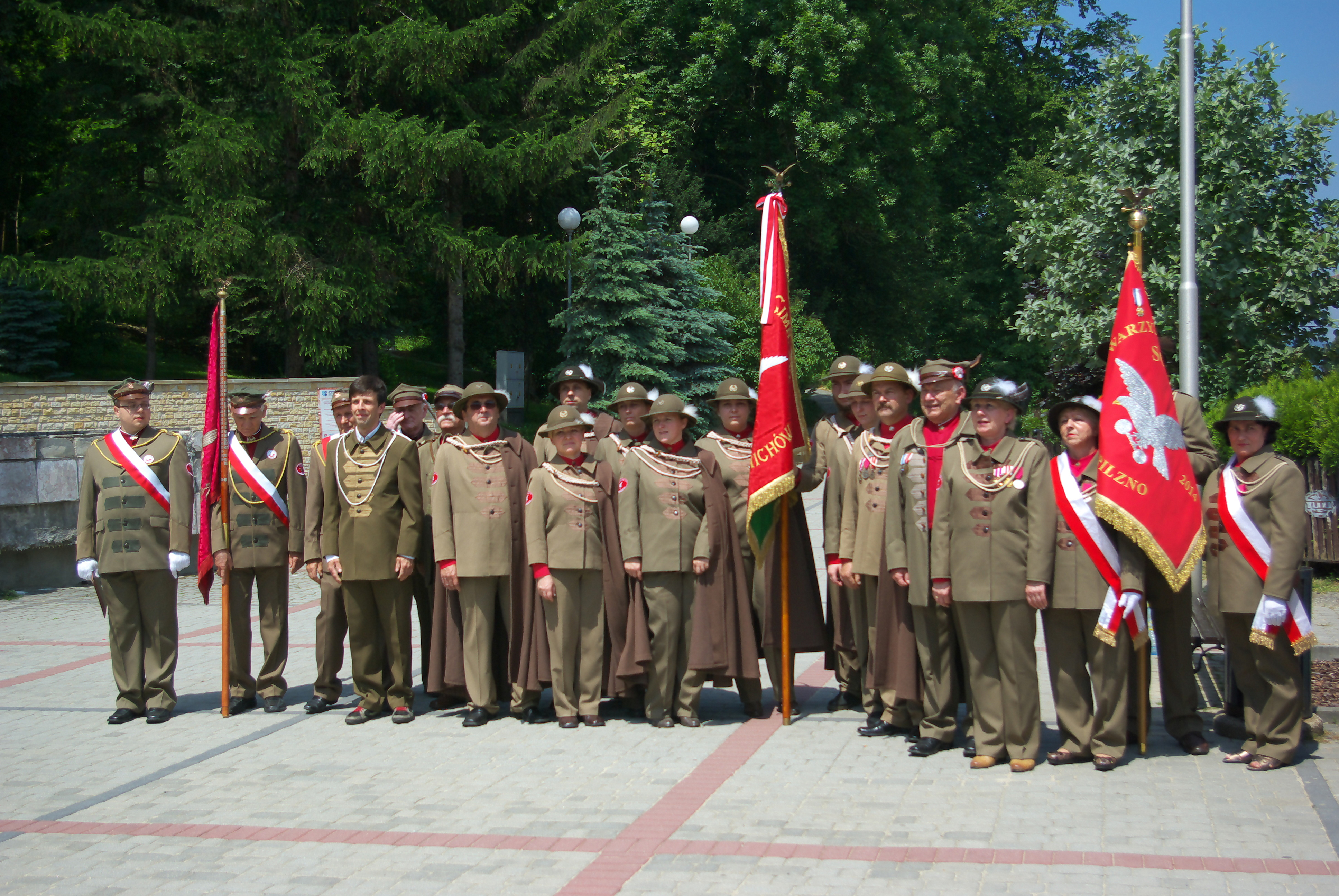 Uroczystości 125-lecia Towarzystwa Gimnastycznego „Sokół” w Sanoku na placu Harcerskim w Sanoku (7 czerwca 2014). Członkowie PTG Sokół